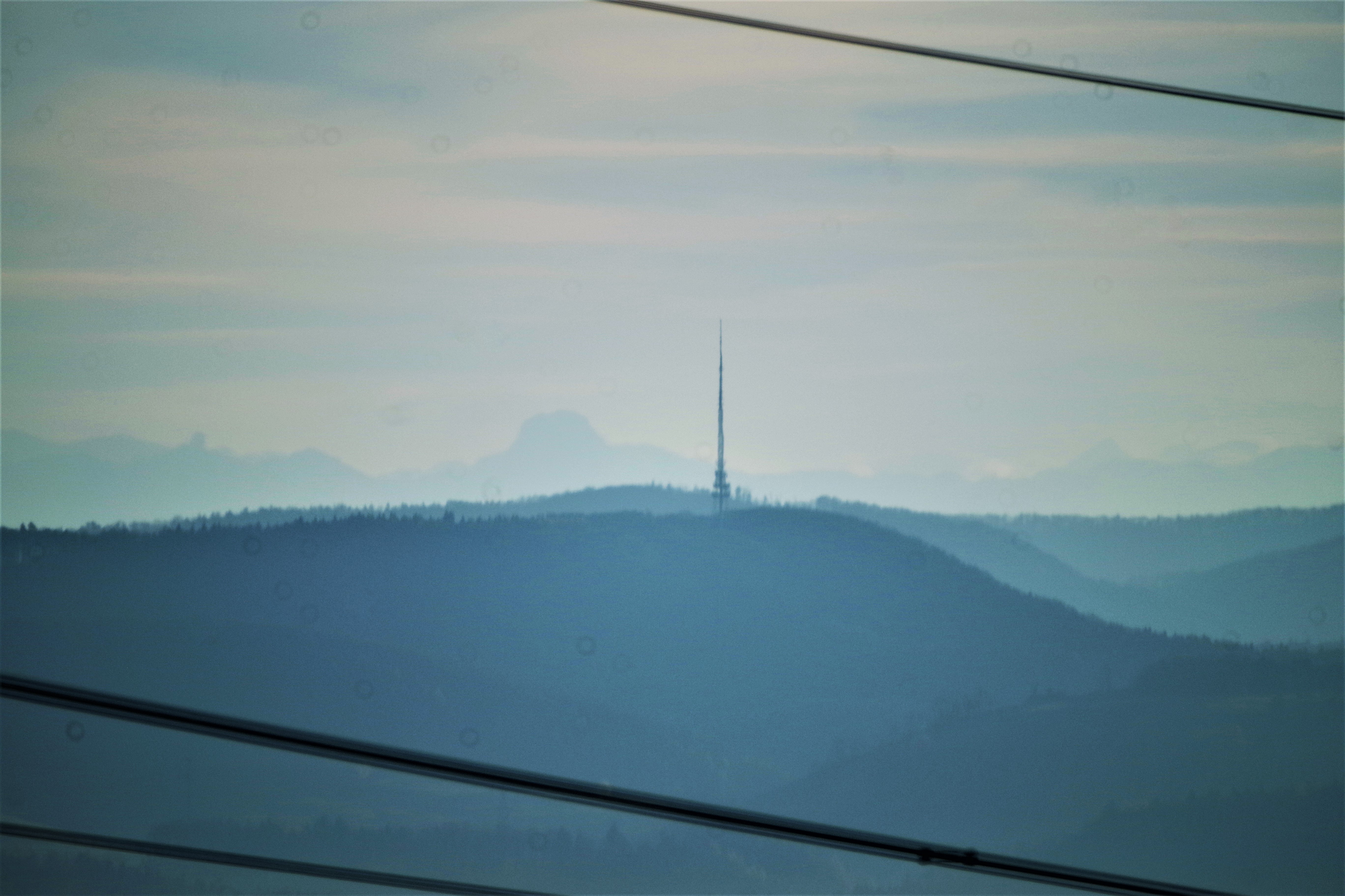 Sendeturm Geissberg (Aargau) im Hintergrund der Montblanc Blick oberhalb Berghaus (Waldshut-Tiengen)